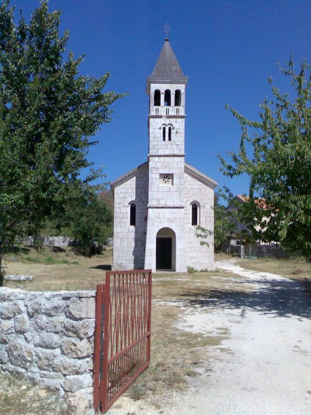 Pravoslavna crkva svetog Petra u Tepljuhu, u Šibensko-kninskoj županiji.